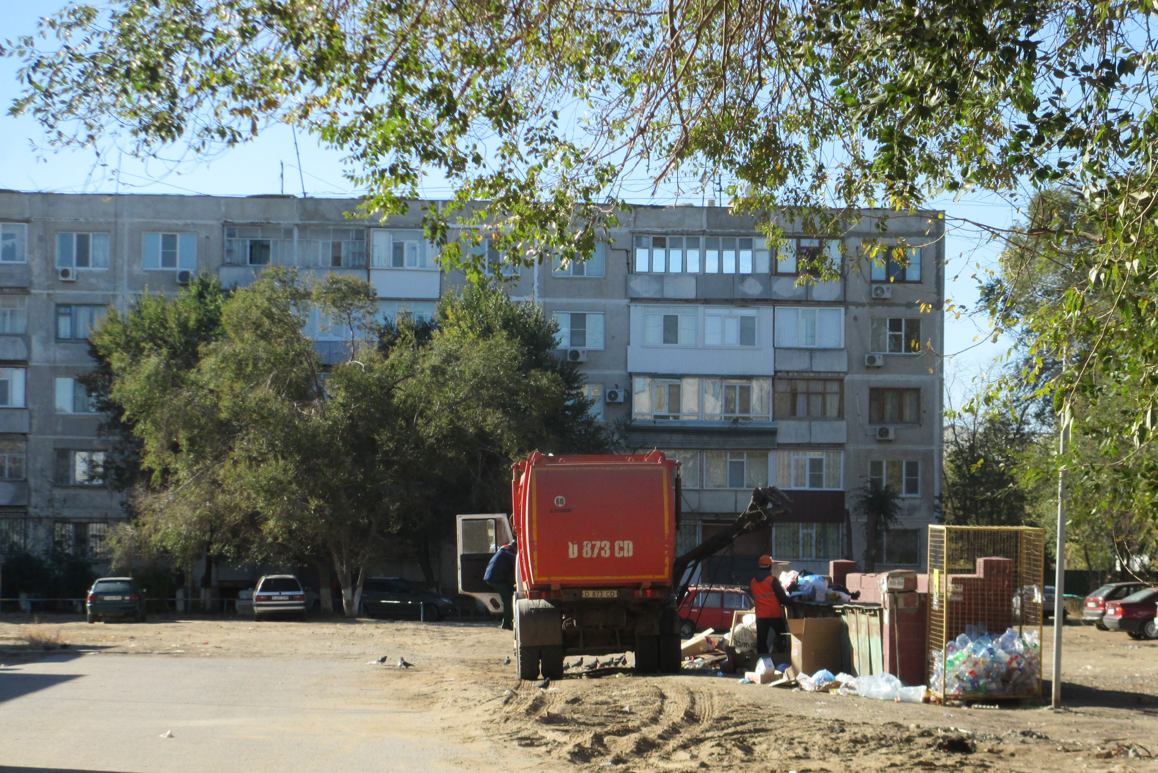 Мусоросборочная машина. Город Актобе, ул. Братьев Жубановых.